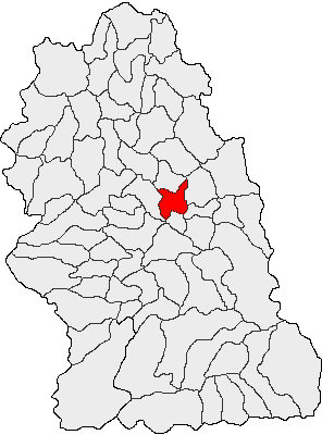 Categorie:Hărţi ale judeţului Hunedoara